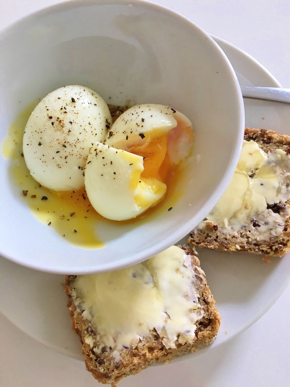 Eier im Glas, mit Butterbrot